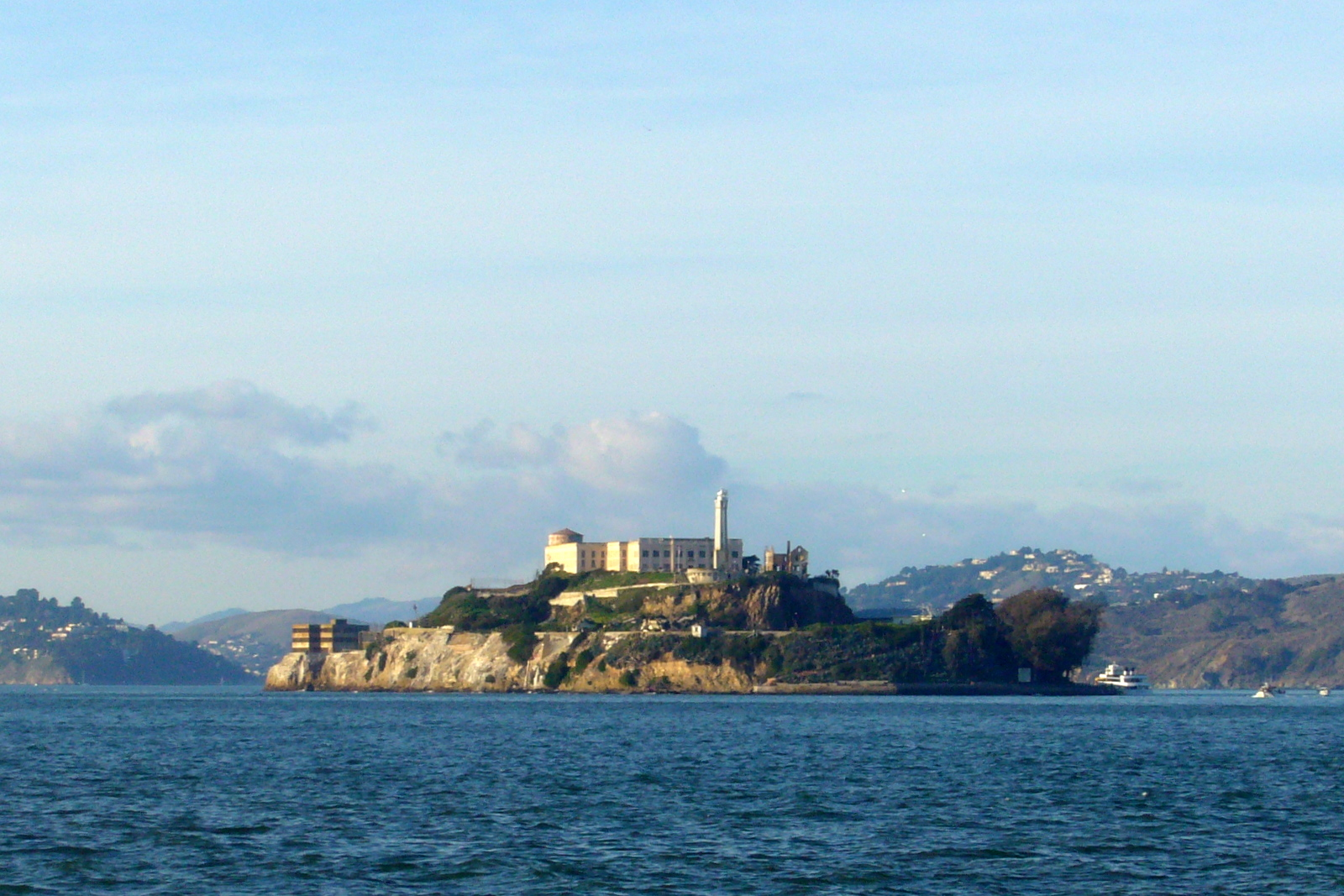 Alcatraz from Pier 39